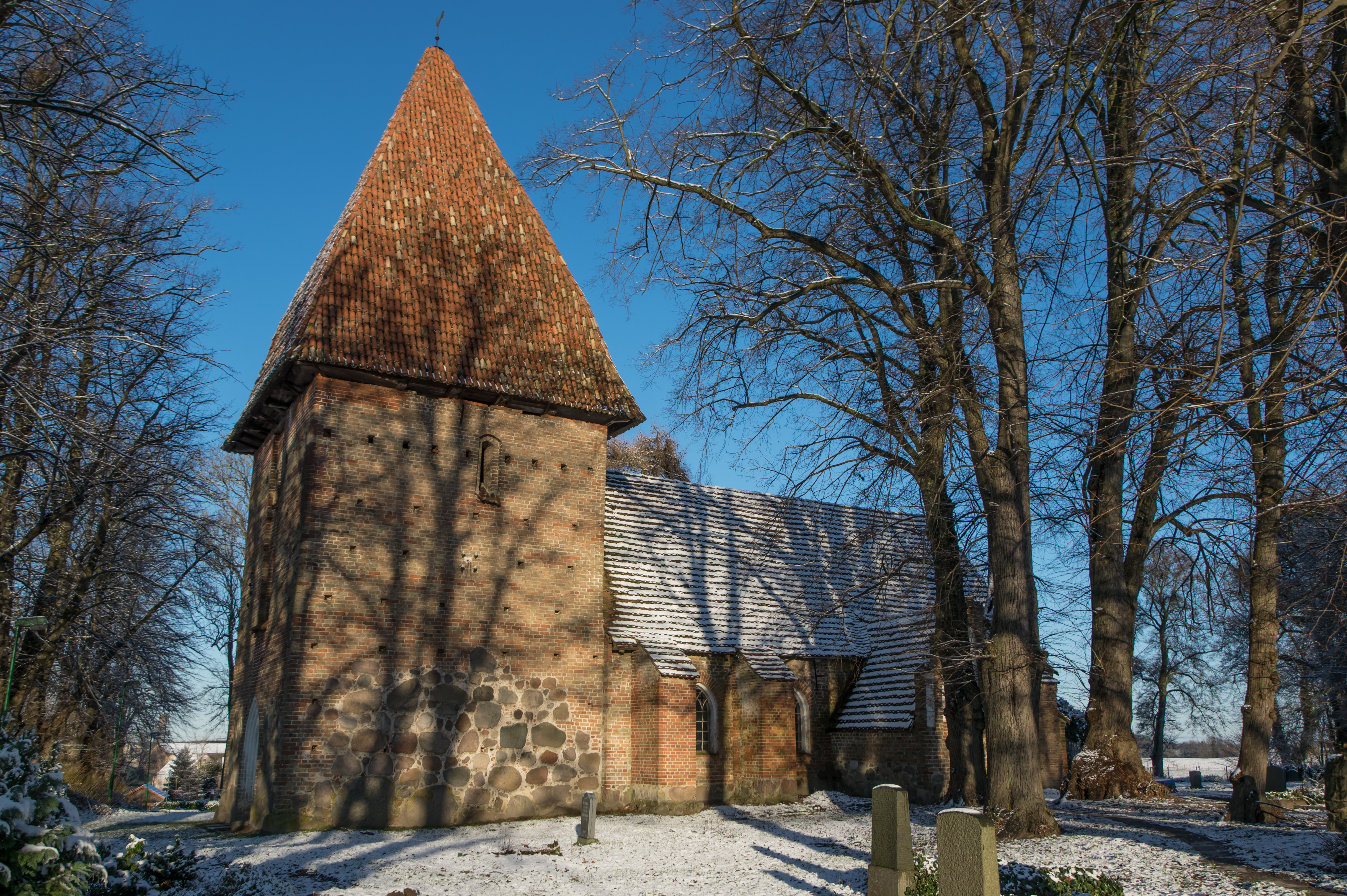 Wiendorf Kirche